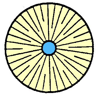 lamelle con lamellule